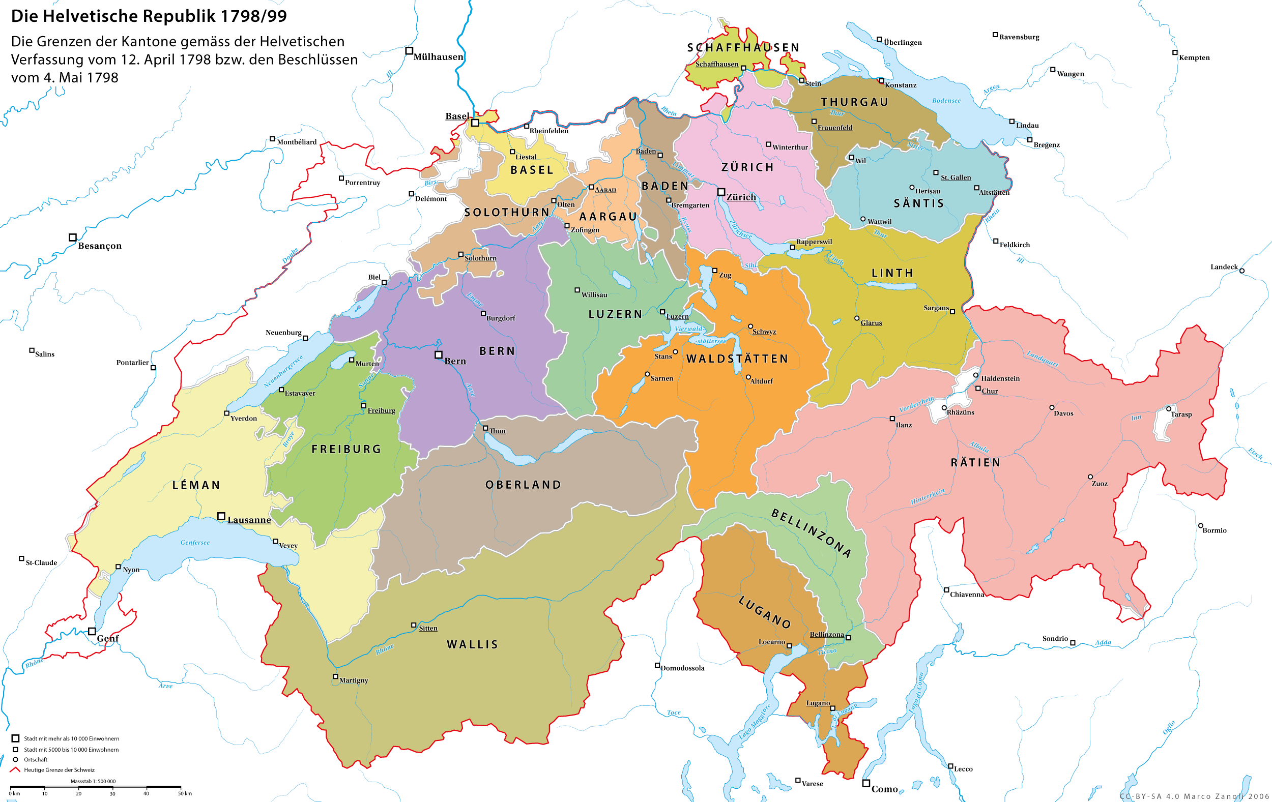 Die Helvetische Republik nach dem Anschluss Graubündens als 19. Kanton am 21.4.1799. Die Helvetische Verfassung wurde am 12.4.1798 in Aarau durch zwölf Kantone (Aargau, Baden, Basel, Bern, Freiburg, Leman, Luzern, Oberland, Schaffhausen, Solothurn, Thurgau und Zürich) beschlossen. Am 4.5.1798 wurde die Bildung von weiteren drei Kantonen (Waldstätte, Linth, Säntis) durch die Zusammenfassung der durch Frankreich unterworfenen Gebiete verfügt